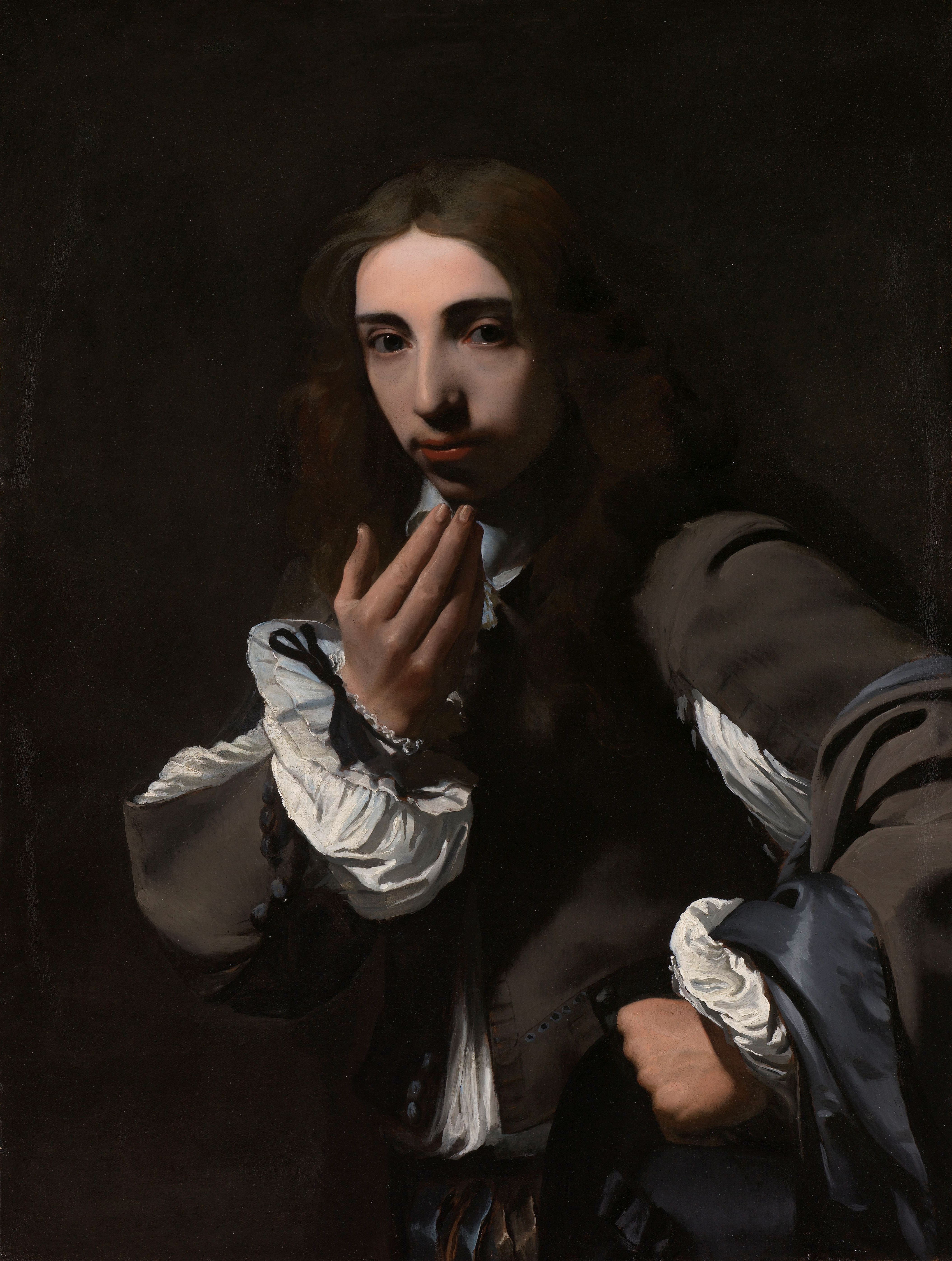 Portret van Joseph Deutz (1624-84). Ten halven lijve, staand met de rechterhand bij de kin, de linkerhand in de zij.; Michael Sweerts (1618–1664), olieverf op doek, ca. 1648–1649